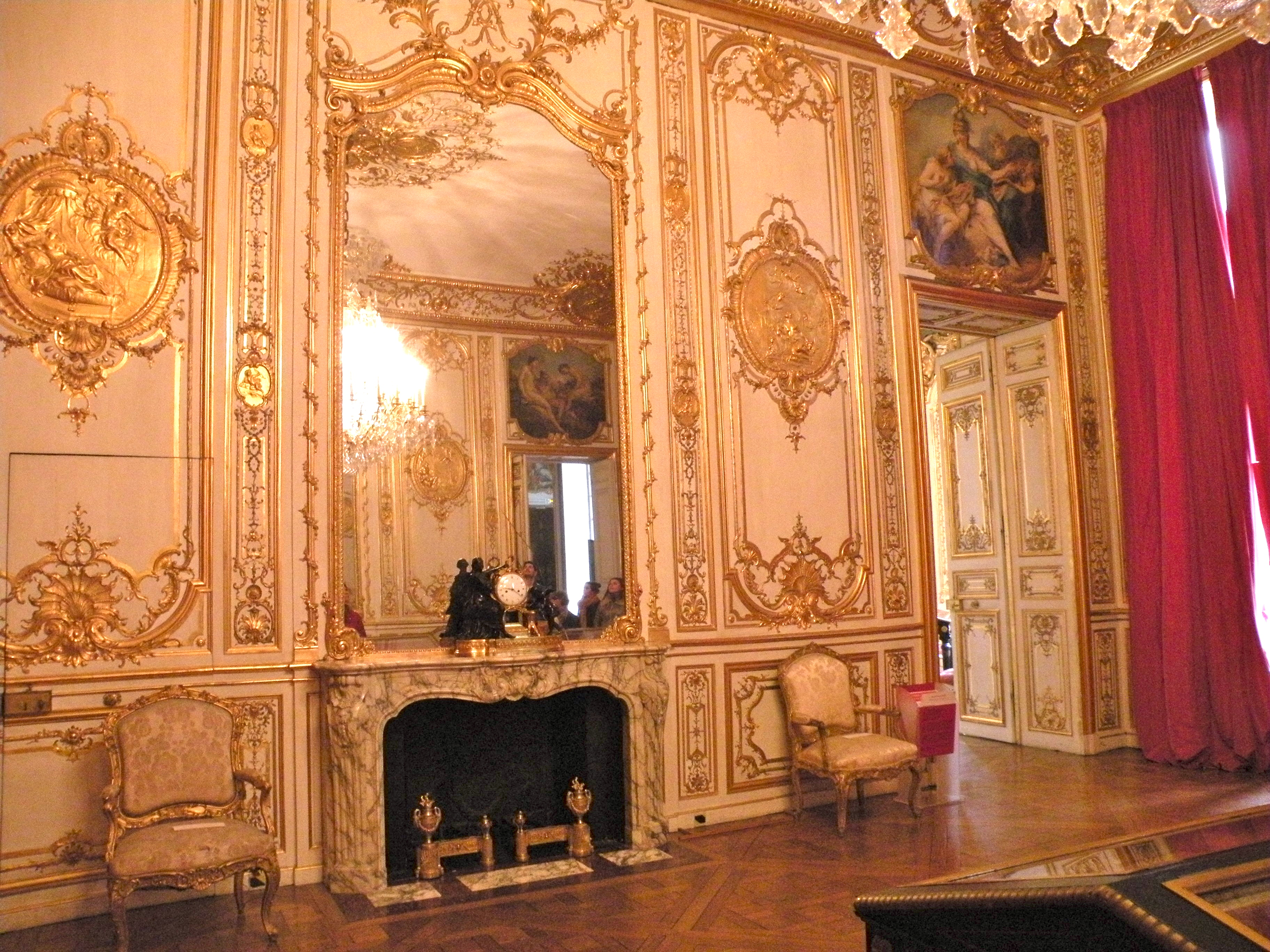 Hôtel de Soubise - Grande chambre de la princesse